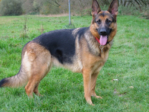 DSH